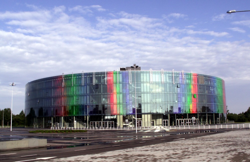 Šiaulių arena